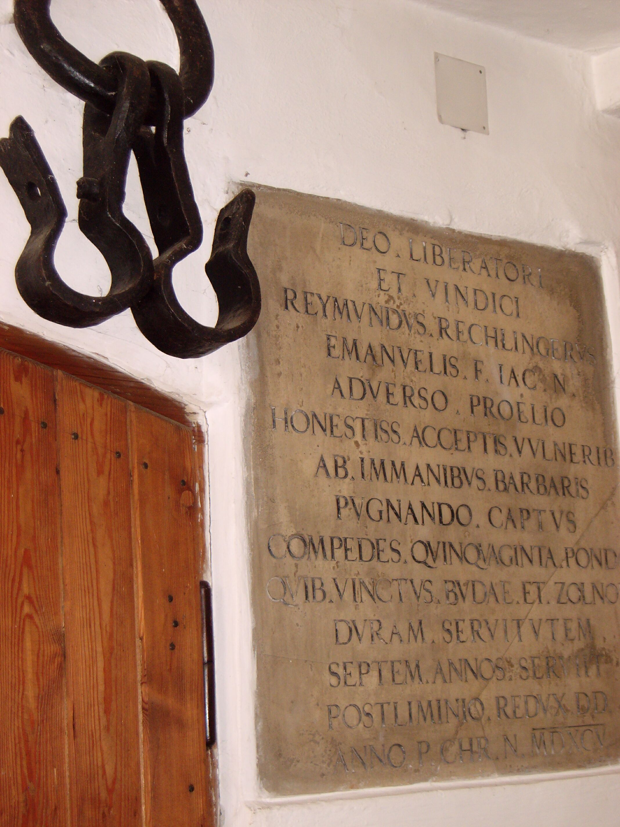 Rehlinger-Ketten im Vorzeichen der Pfarrkirche Mariä Verkündigung (Leeder), Gemeinde Fuchstal, Germany